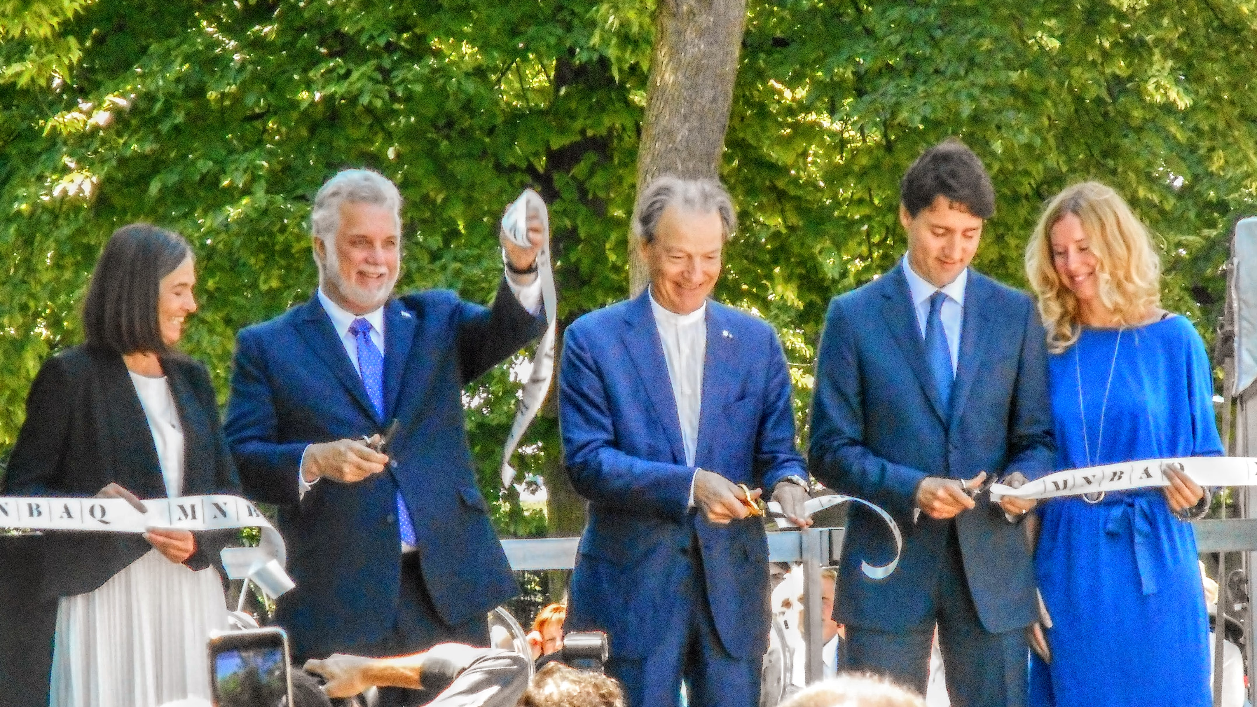 Inauguration officielle du pavillon Pierre-Lassonde De gauche à droite Line Ouellet, directrice et conservatrice en chef du MNBAQ Philippe Couillard, Premier Ministre du Québec Pierre Lassonde, homme d'affaire et mécène Justin Trudeau, Premier Ministre du Canada Julie Lemieux, vice-président du comité exécutif de la Ville de Québec